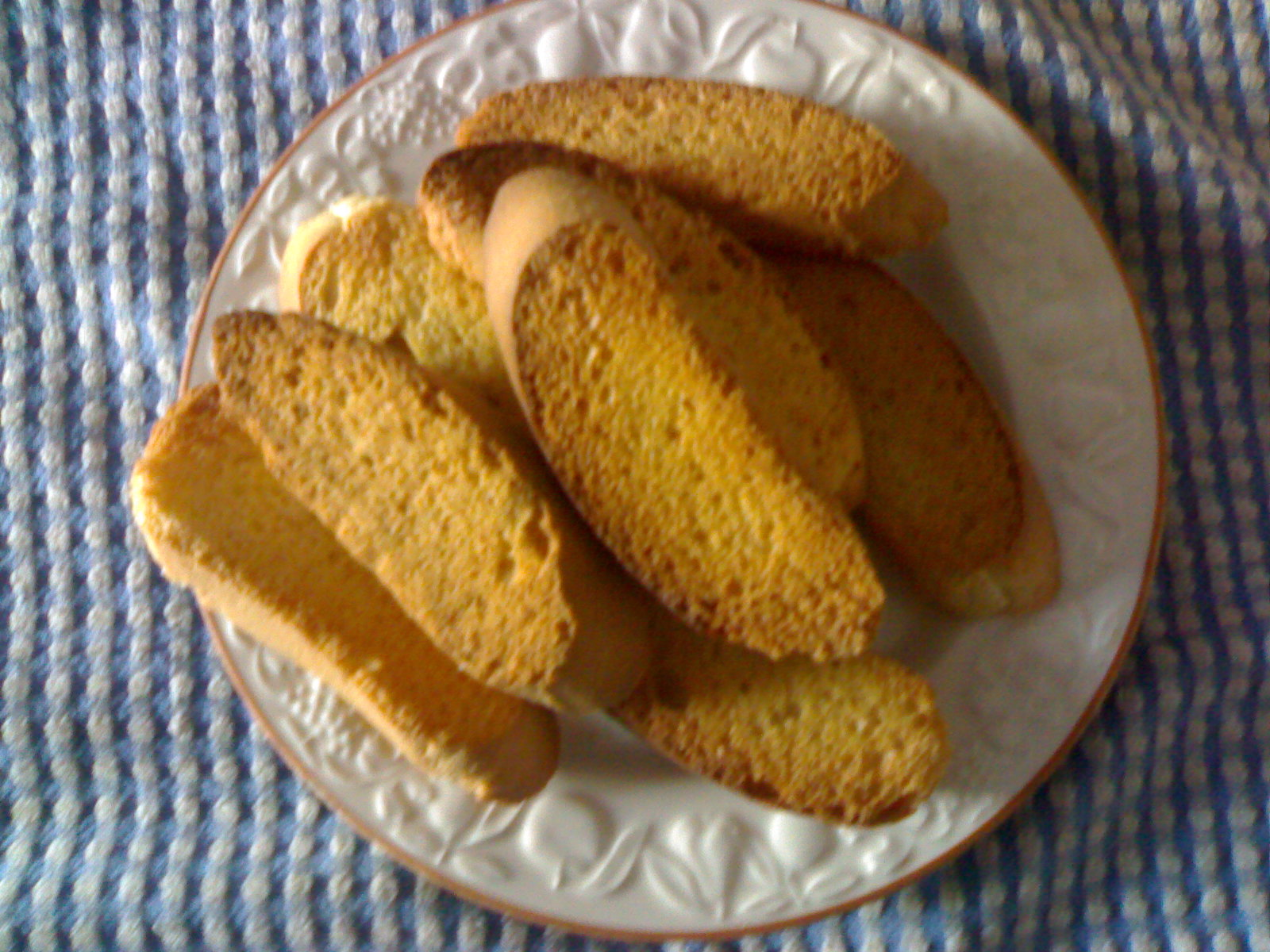 biscotti lagaccio tipici del Genovesato e del Basso Piemonte tra la provincia di Genova e la provincia di Alessandria.